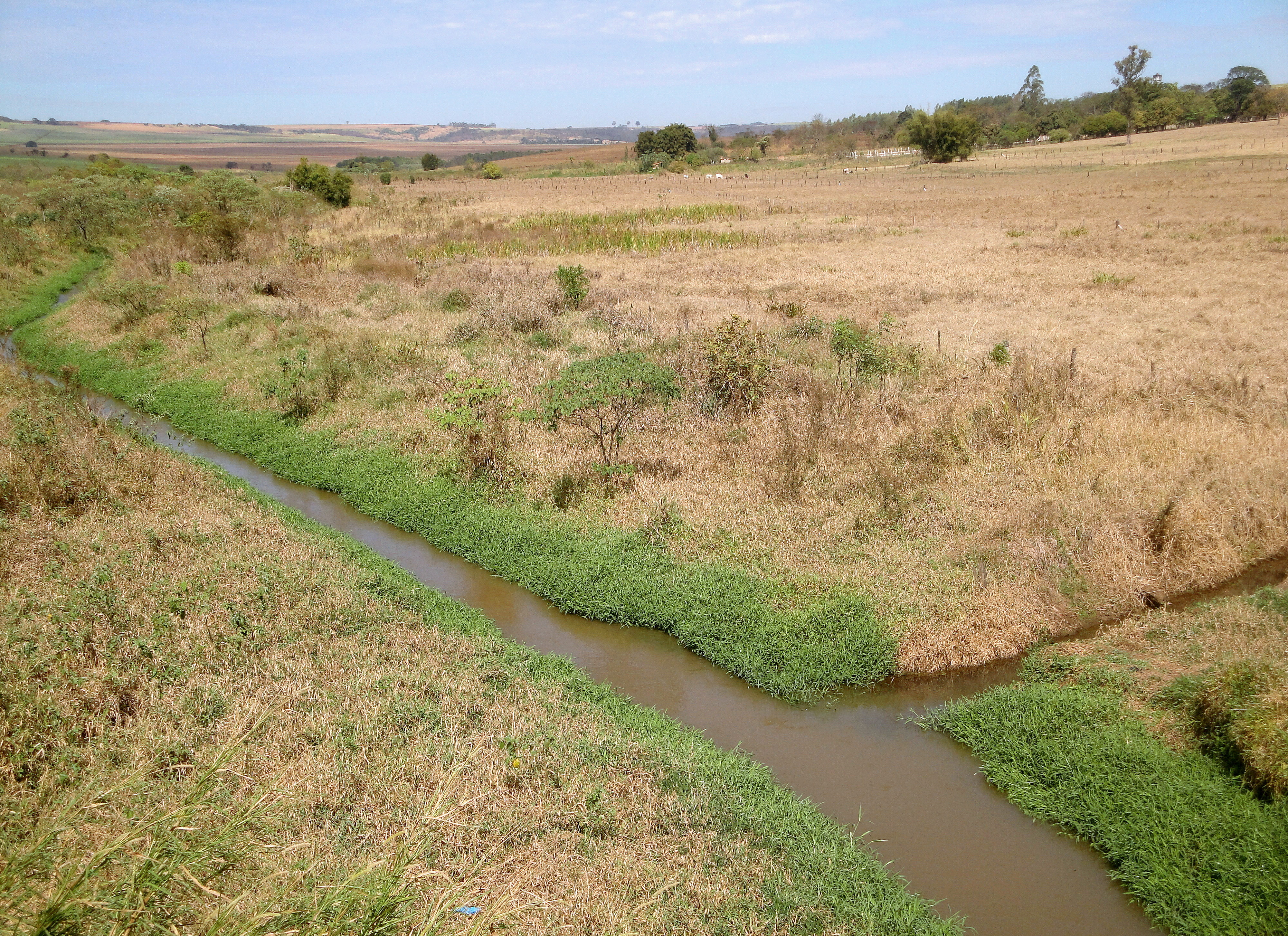 Ribeirão Rancho Queimado, chegando em Rincão pelo acesso da SP-255 - Rodovia Paulo de Arruda Correa da Silva SP051/255